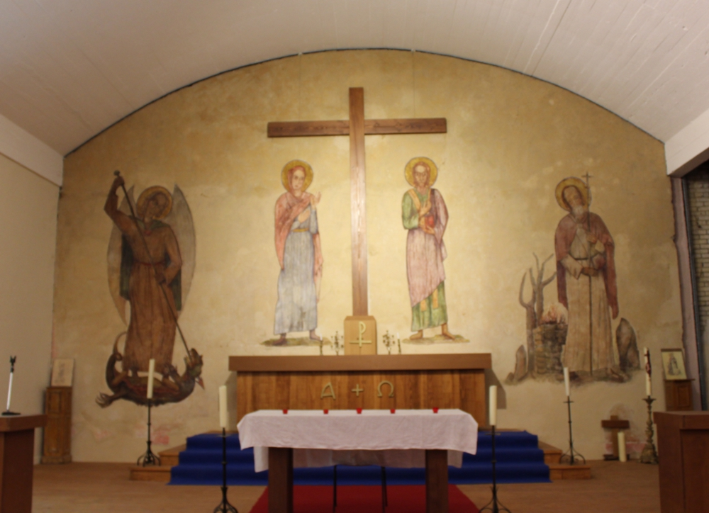 Lagerkapelle des Stacheldrahtseminars von Chartres, 2005.